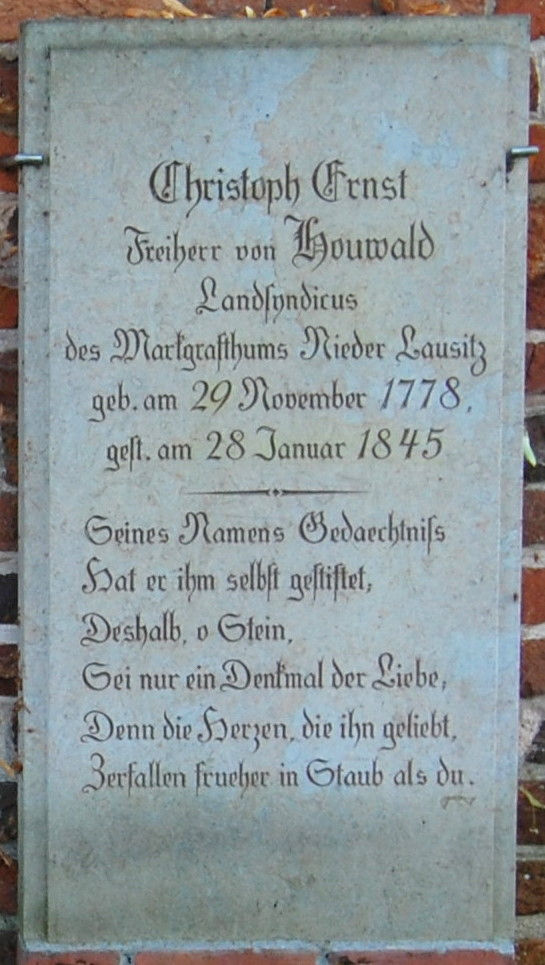 Grabstein des Christoph Ernst von Houwald (1778-1845) Christoph Ernst Freiherr von Houwald Landsyndicus des Markgrafthums Nieder Lausitz geb. am 29 November 1778 gest. am 28 Januar 1845 Seines Namens Gedaechtniss Hat er ihm selbst gestiftet, Deshalb, o Stein, Sei nur ein Denkmal der Liebe, Denn die Herzen, die ihn geliebt, Zerfallen frueher in Staub als du.